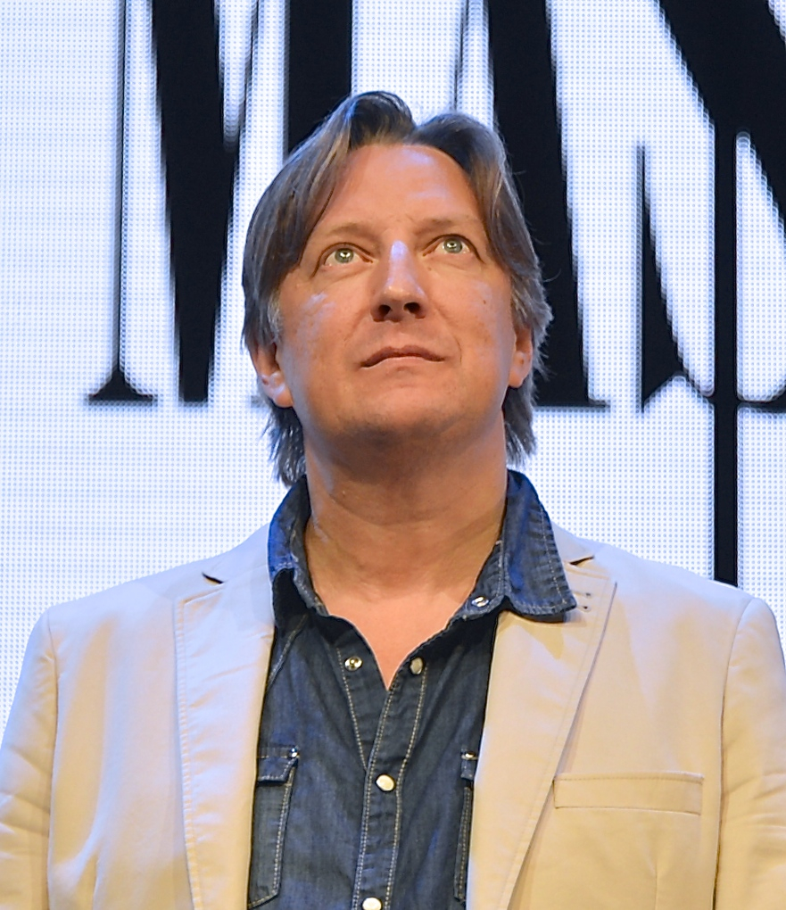 Per Svensson under Öppet hus på Dramaten den 6 september 2014.